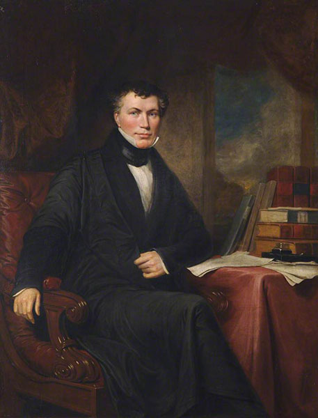 Tekdüzelik William Whewell tarafından icat edildi